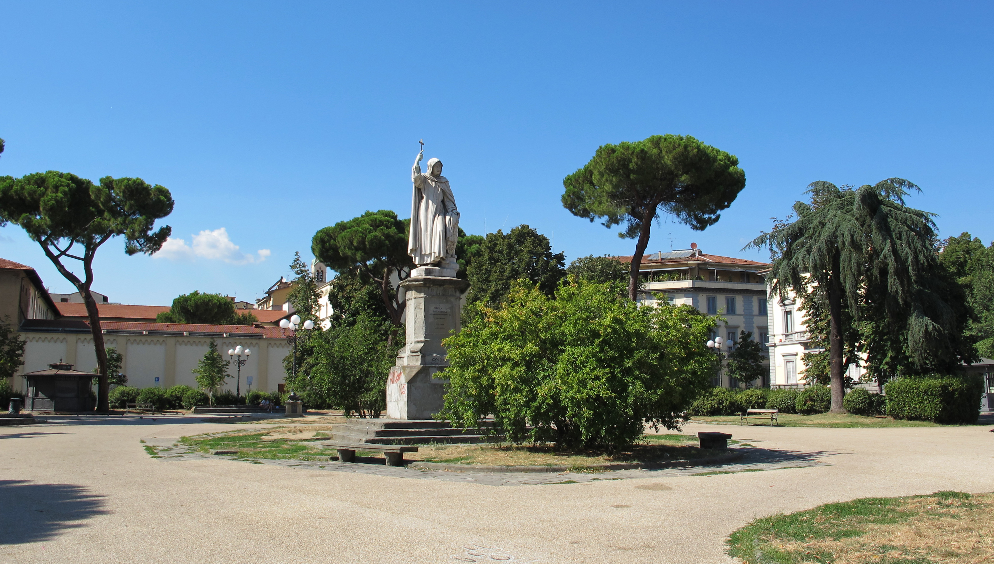 Piazza Savonarola (Florence)